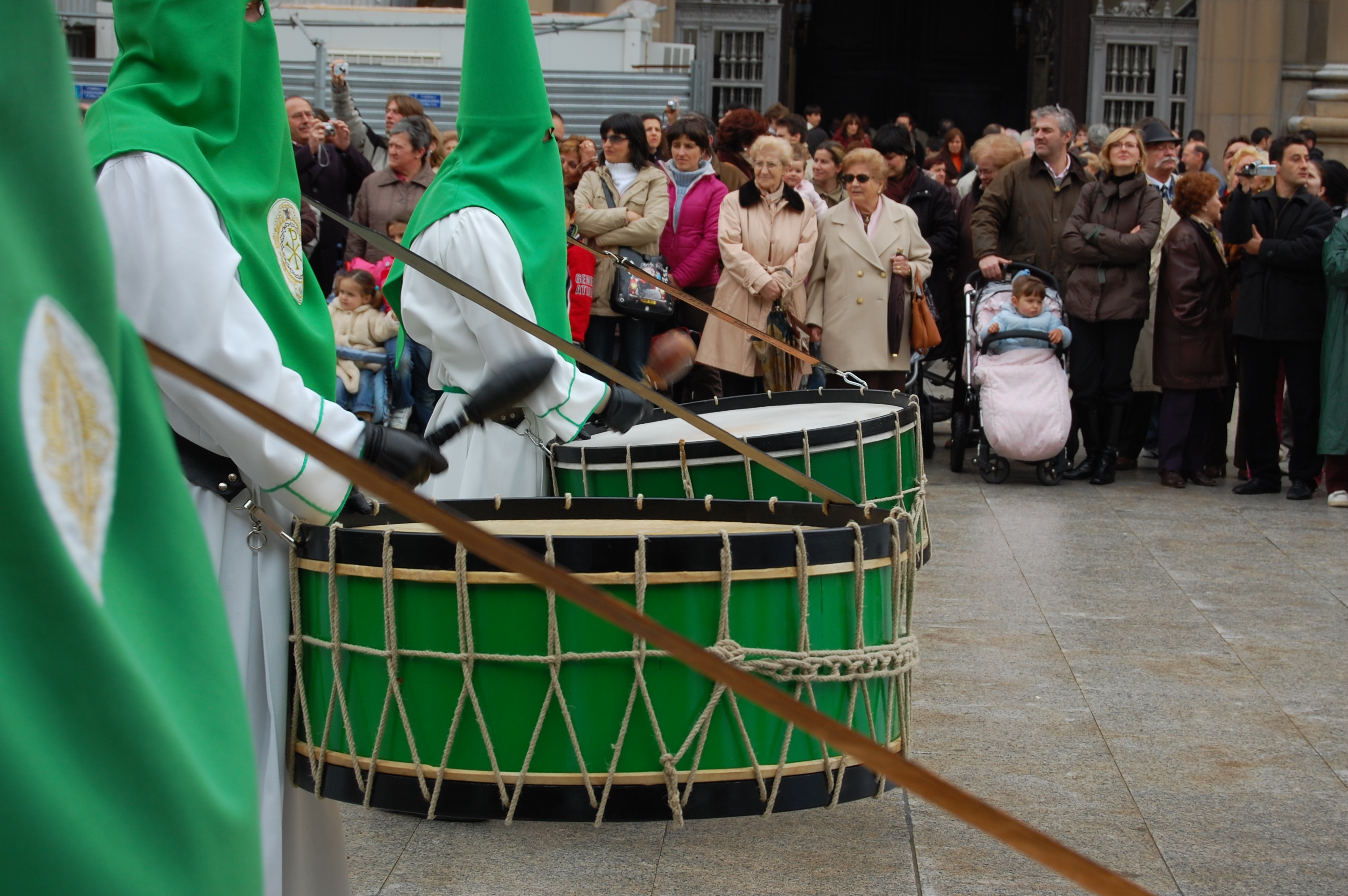 Zaragoza, Semana Santa, capirotes, nazarenos, bombos (etiquetas de la foto en Flickr).